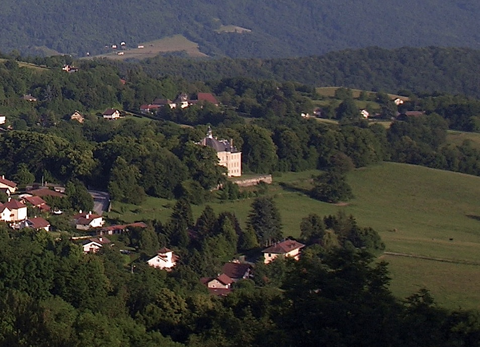 IL CASTELLO DI HERBEYS. Dettaglio di file:Herbeys panorama.JPG